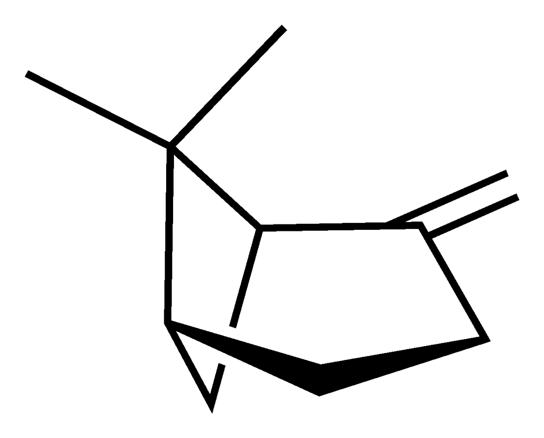 Skeletal formula of (−)-β-pinene